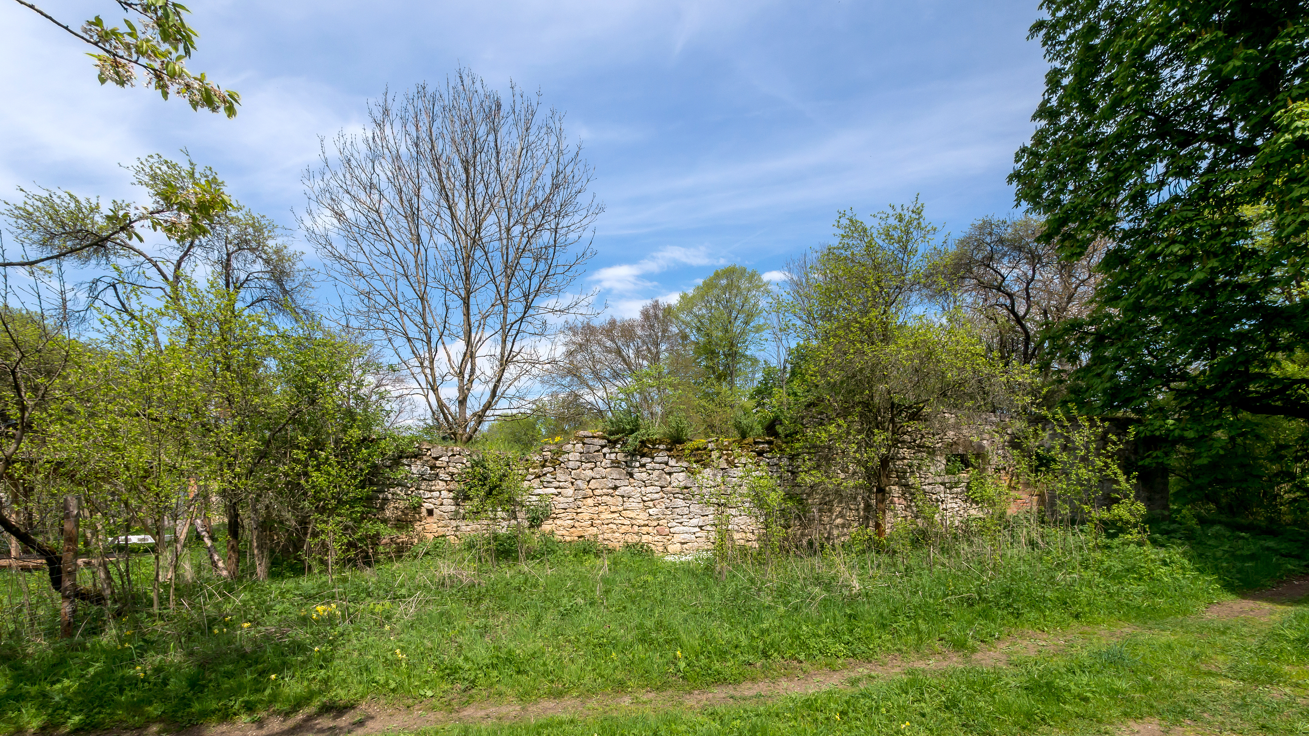 Schmieden Am Forsthaus Siedlungsreste Wüstung Spaal XII